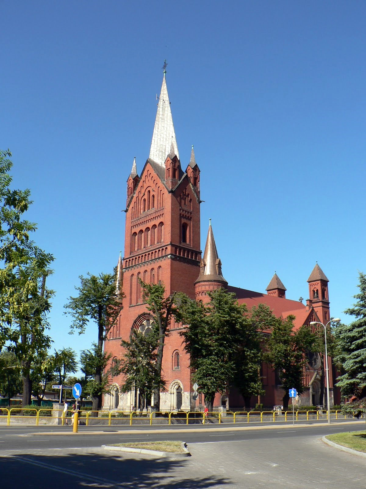 Kościół pw. Zwiastowania NMP w Inowrocławiu